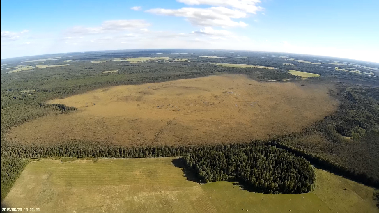 Aukštasis Tyras